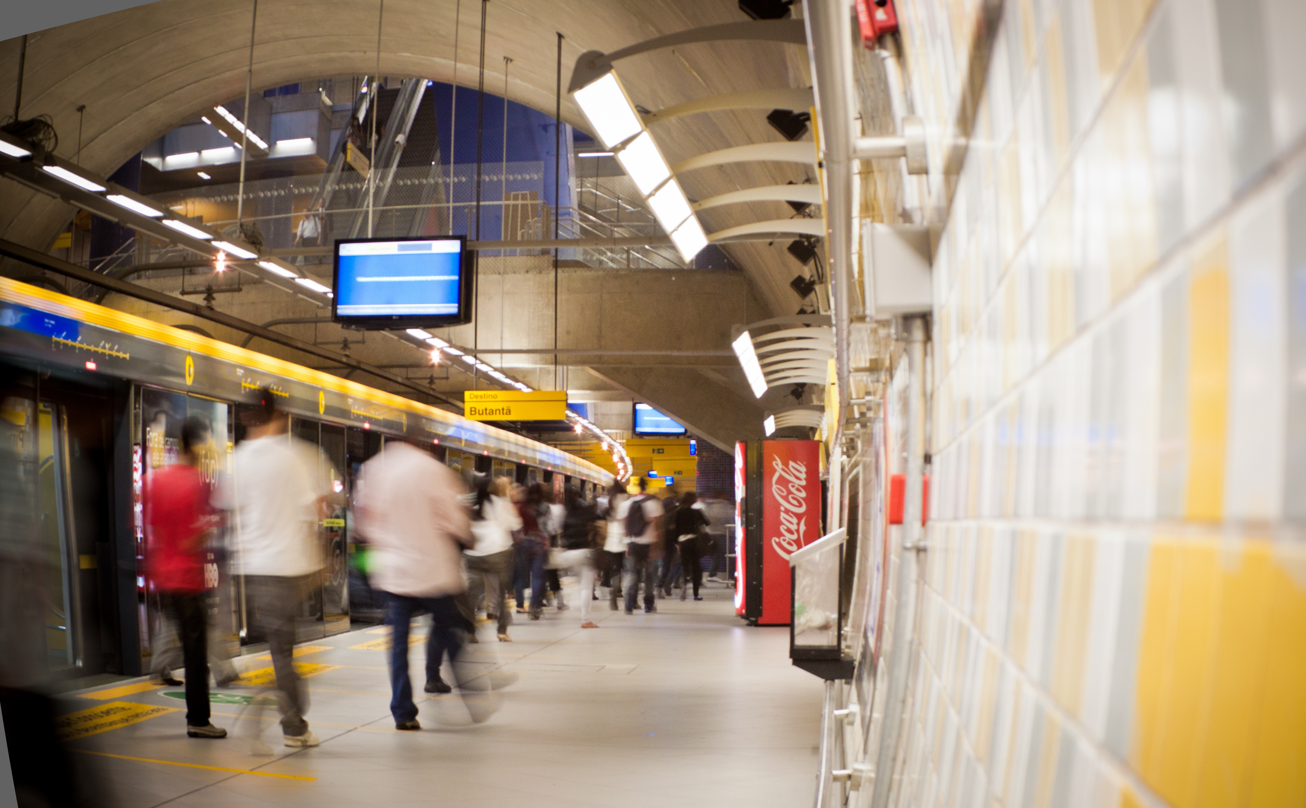 A yellow themed walk around. Last fisheye edited picture from Pinheiros Station